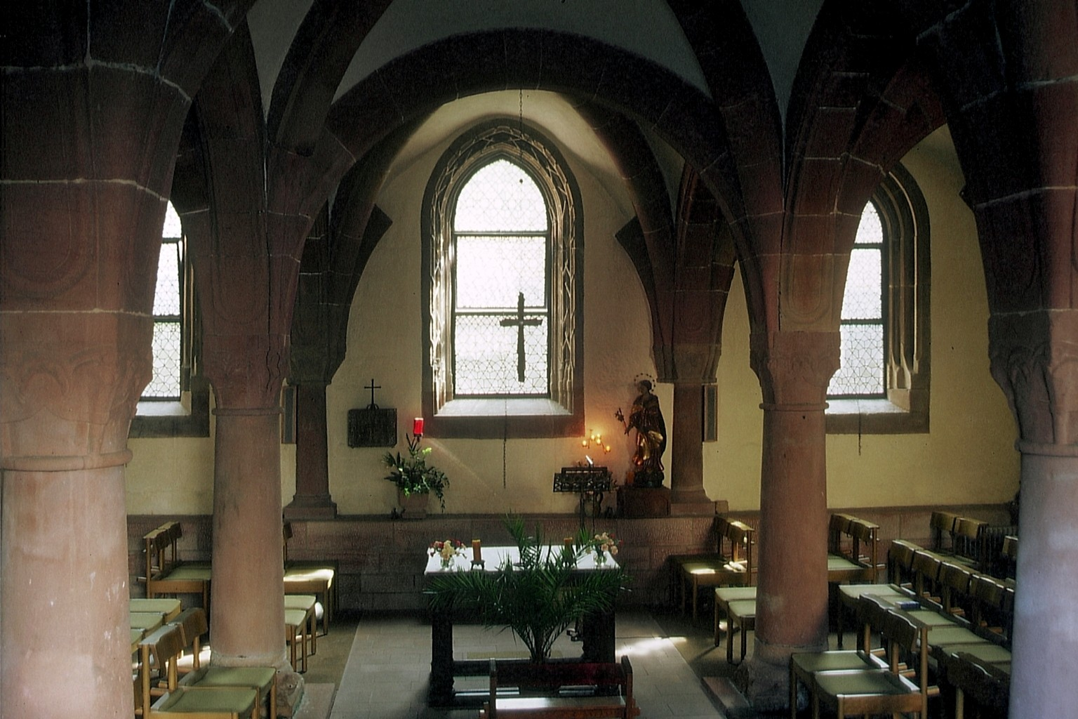 Otterberg, Kapitelsaal neben der Abteikirche